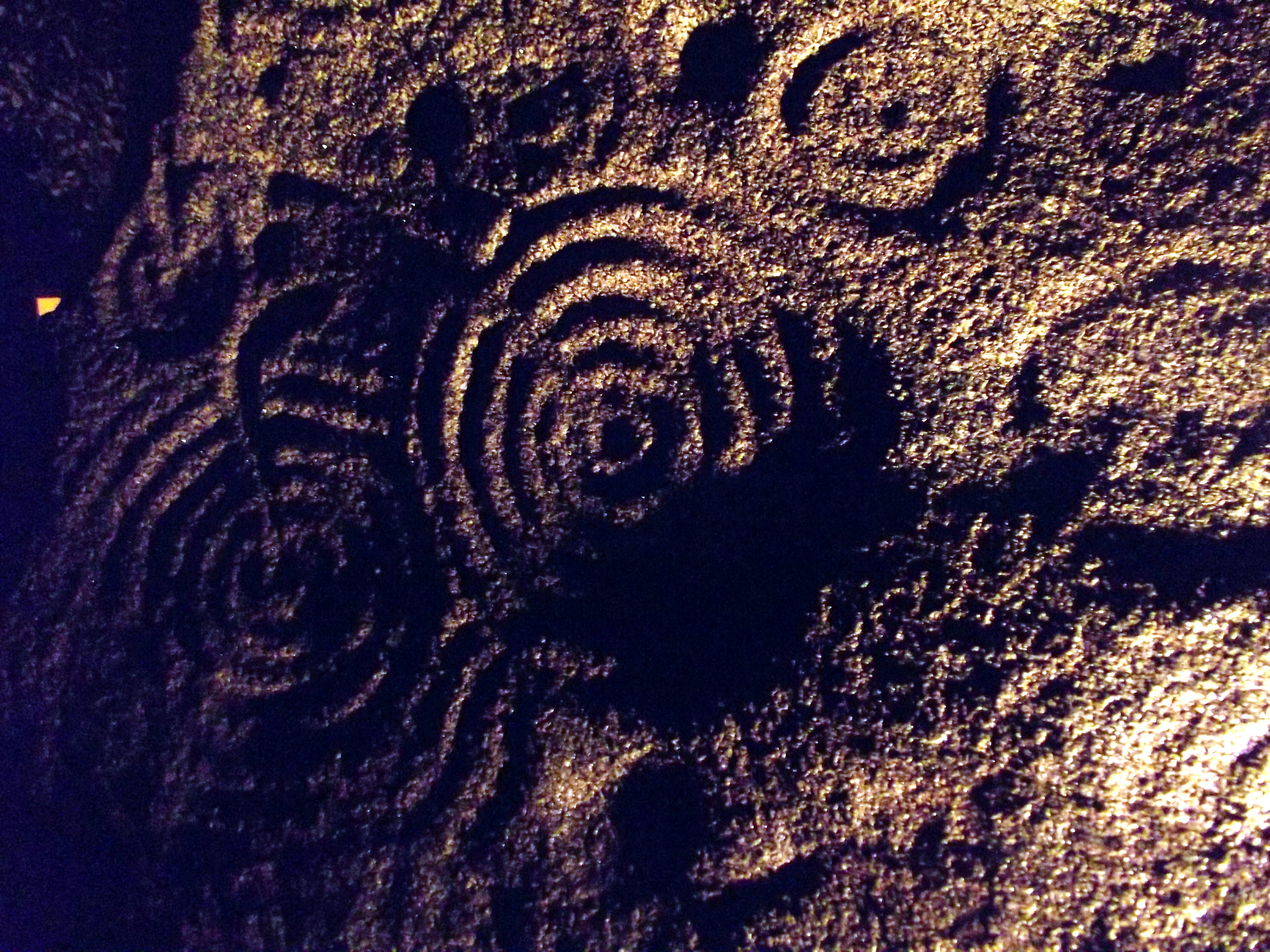 Sa Perda Pinta